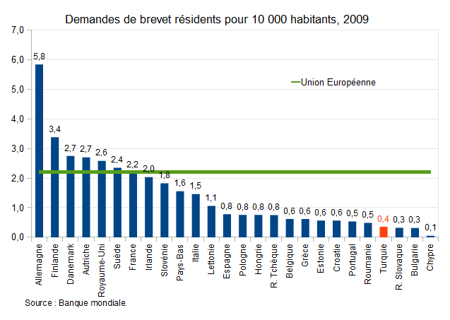 Demandes de brevet, résidents 2009 - Banque Mondiale